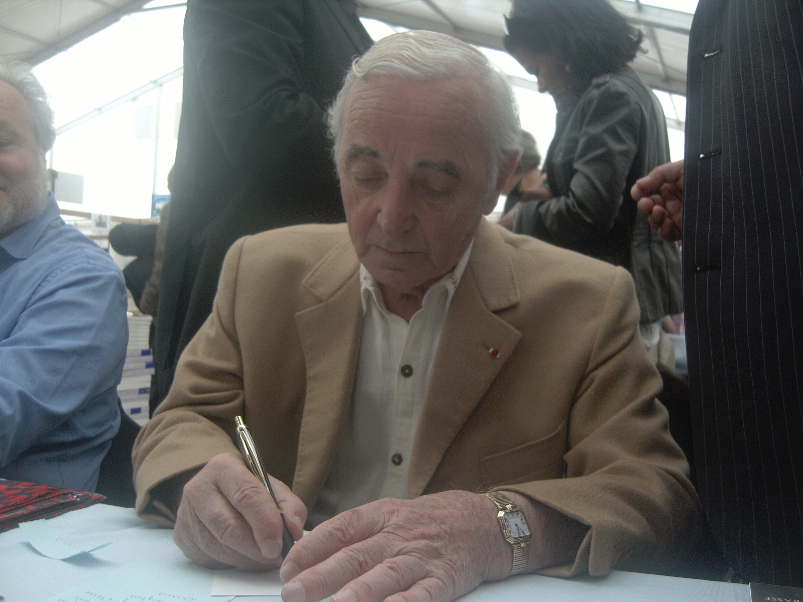 Le chanteur Charles Aznavour à la 27ème Foire du Livre de Saint-Louis.